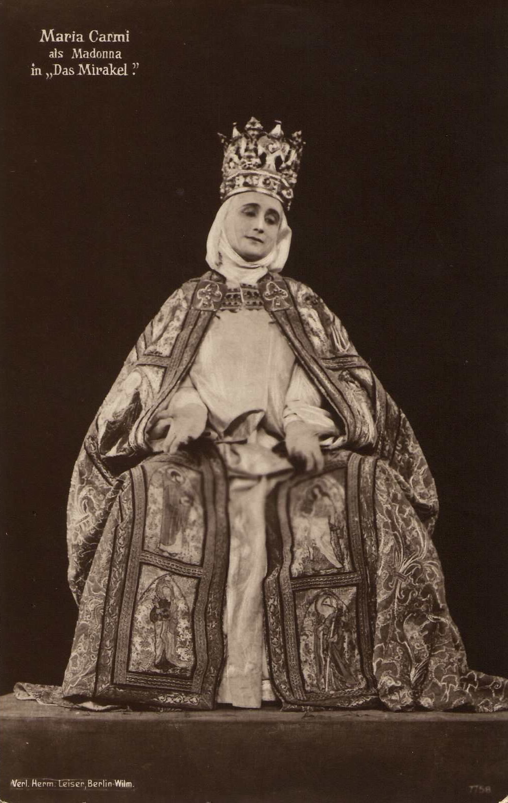 Maria Carmi als Madonna in "Das Mirakel"